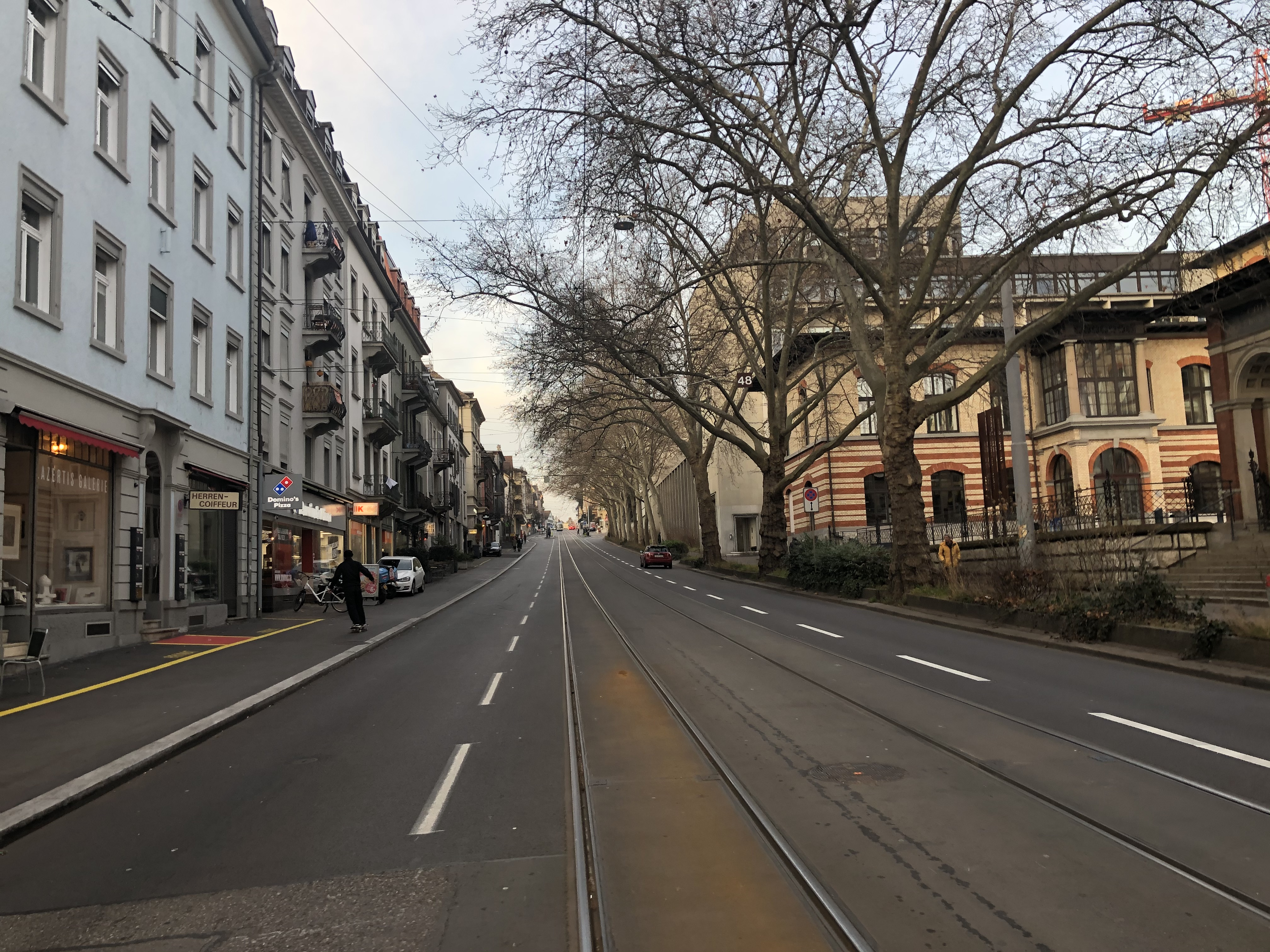 Universitätsstrasse in Zürich